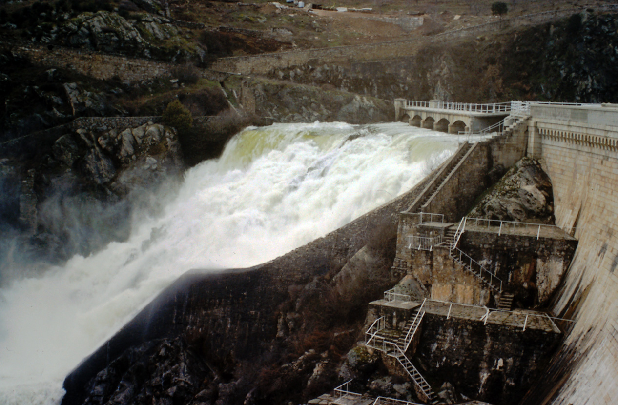 Embalse de El Villar aliviando agua durante el temporal de lluvias de febrero de 1.978